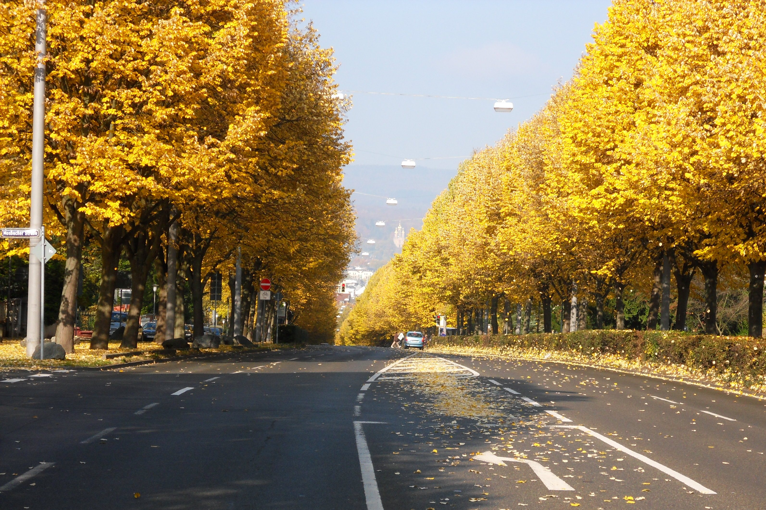 Biebricher Allee in Wiesbaden im Herbst mit Blick nach Norden über die Innenstadt zum Neroberg mit der Russischen Kirche